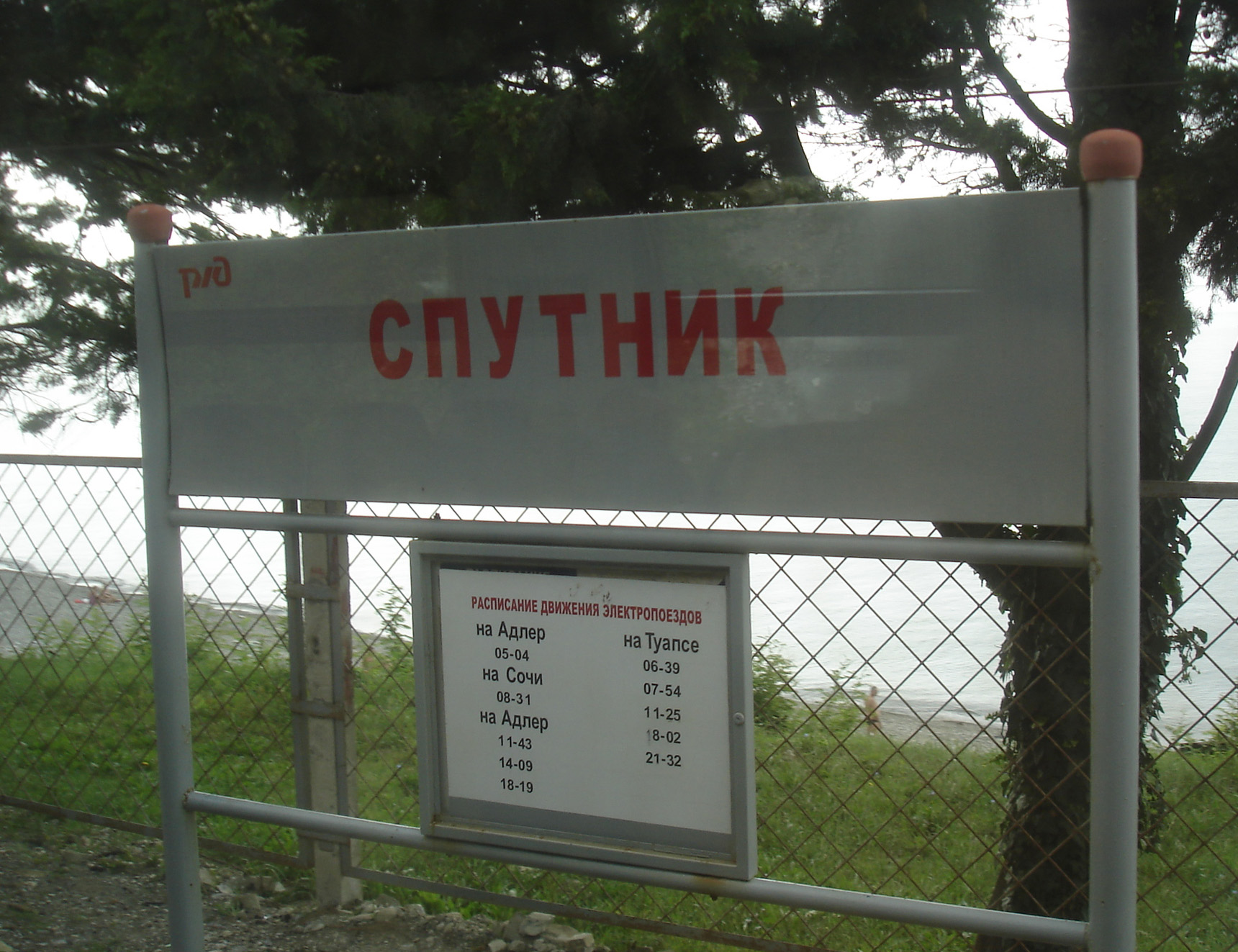 Железнодорожная станция Спутник